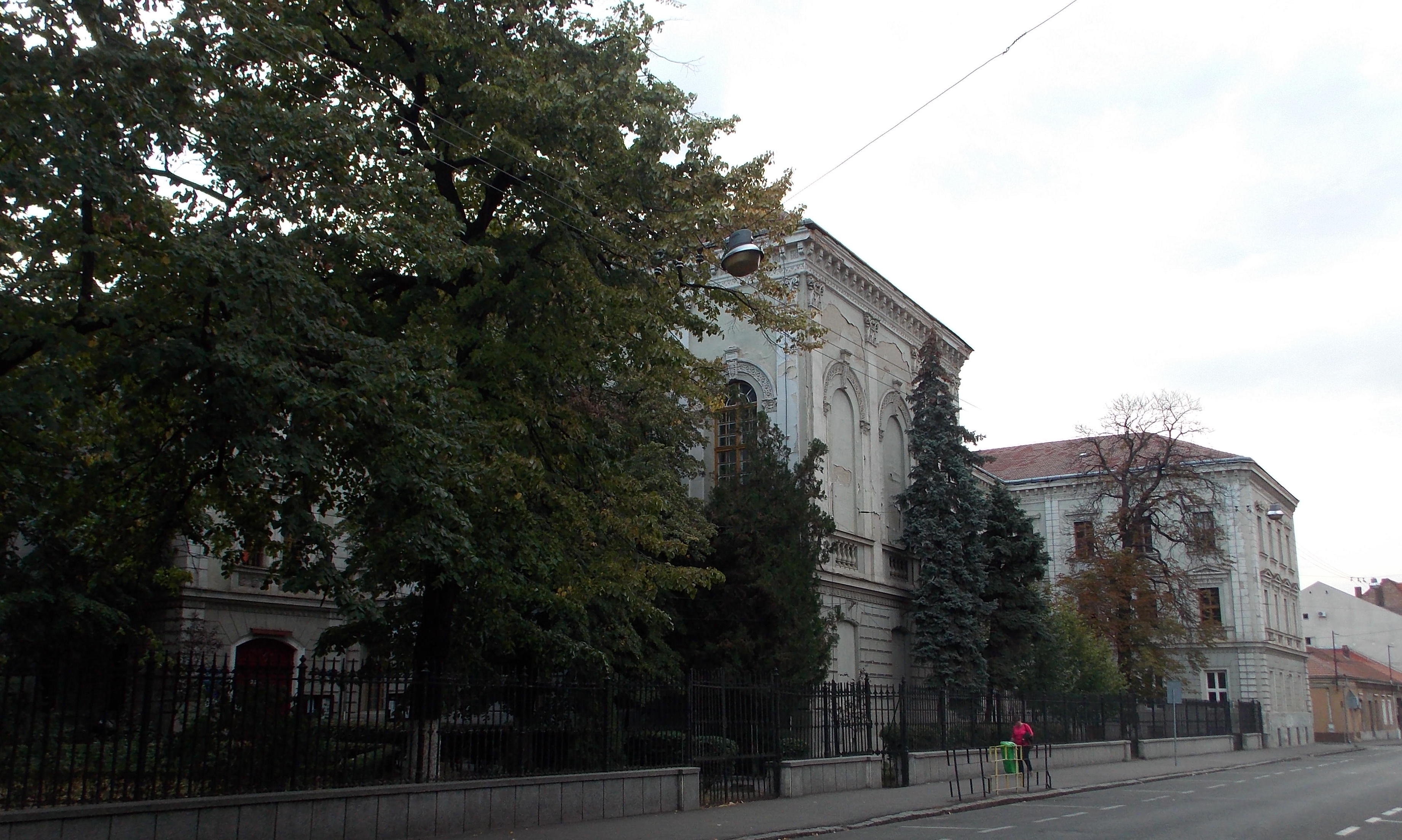 Colegiul Național "Mihai Eminescu", fosta mănăstire și Gimnaziu Premonstratens și Academie de Drept